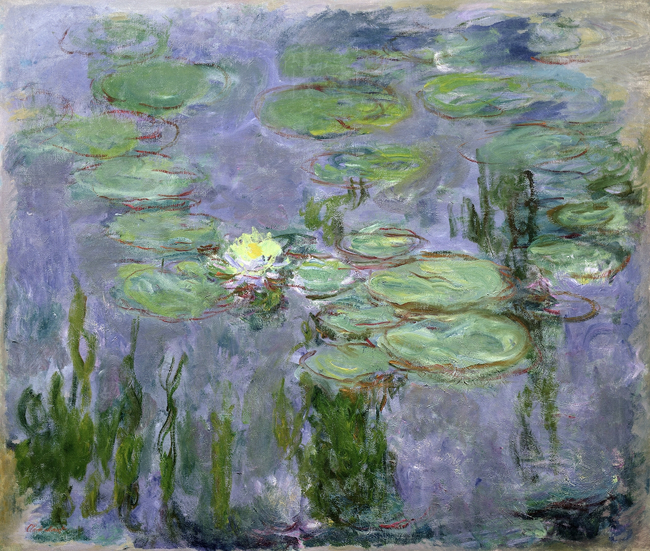 Seerosen 1915 Öl auf Leinwand 130 x 153 cm